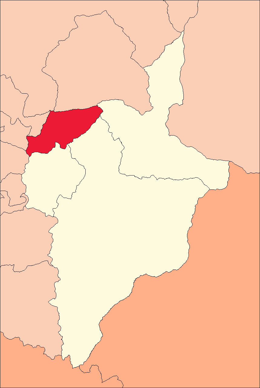 Área del distrito de Umari.